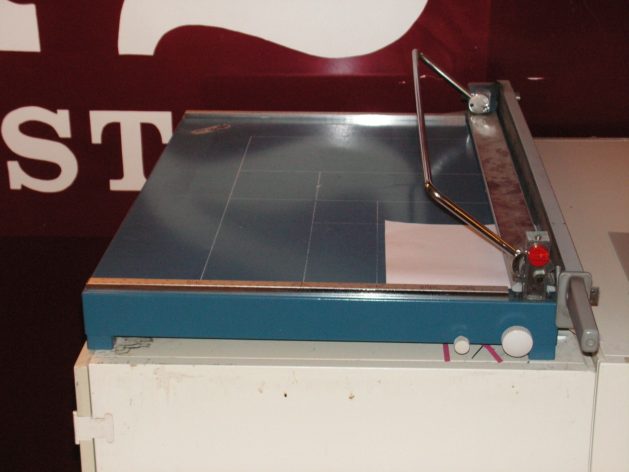 Photo: Stefan Linder